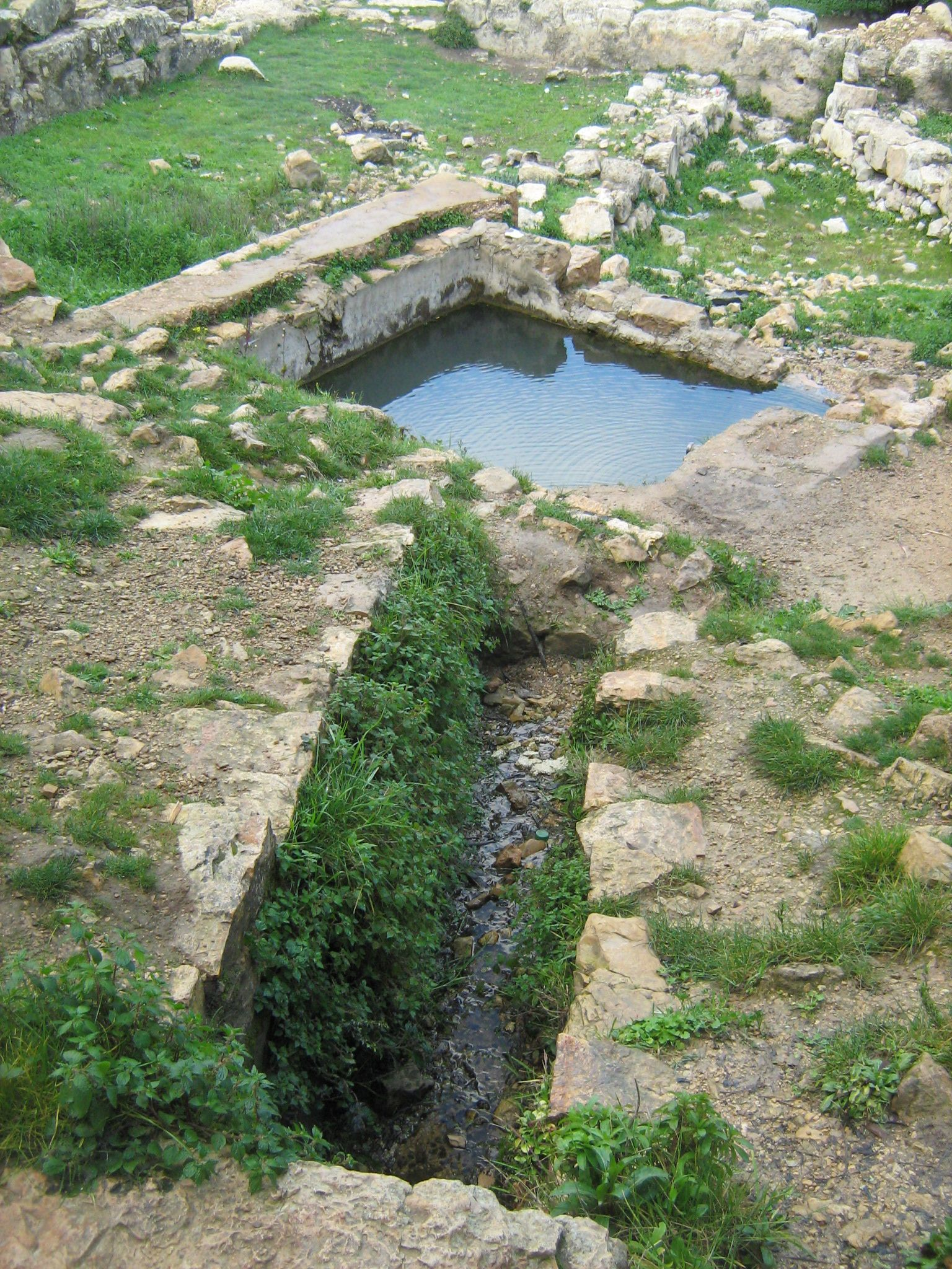 עין לימון